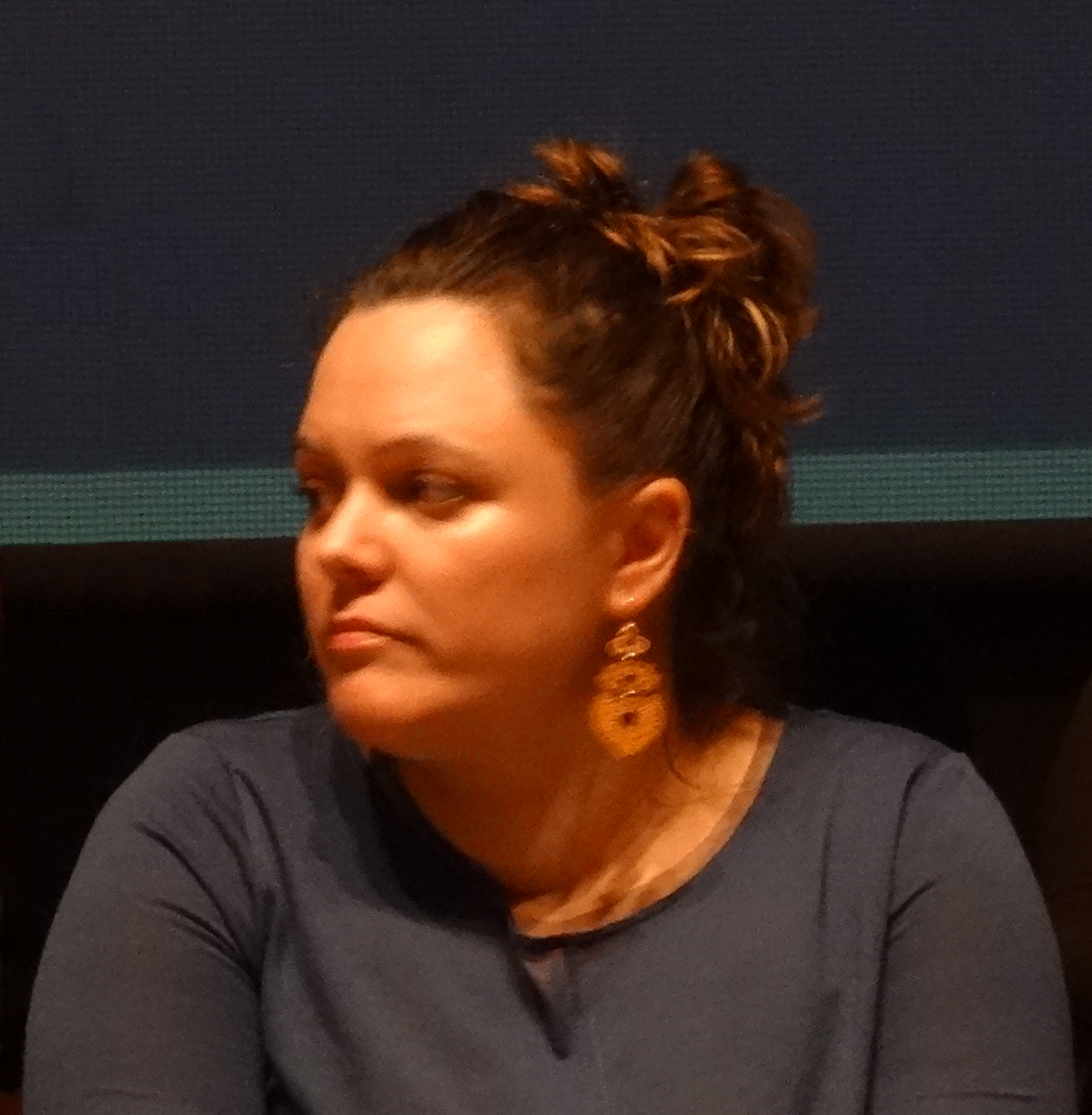 Olaia Ledo Díaz, política do BNG na XV Asemblea Nacional no 2016.